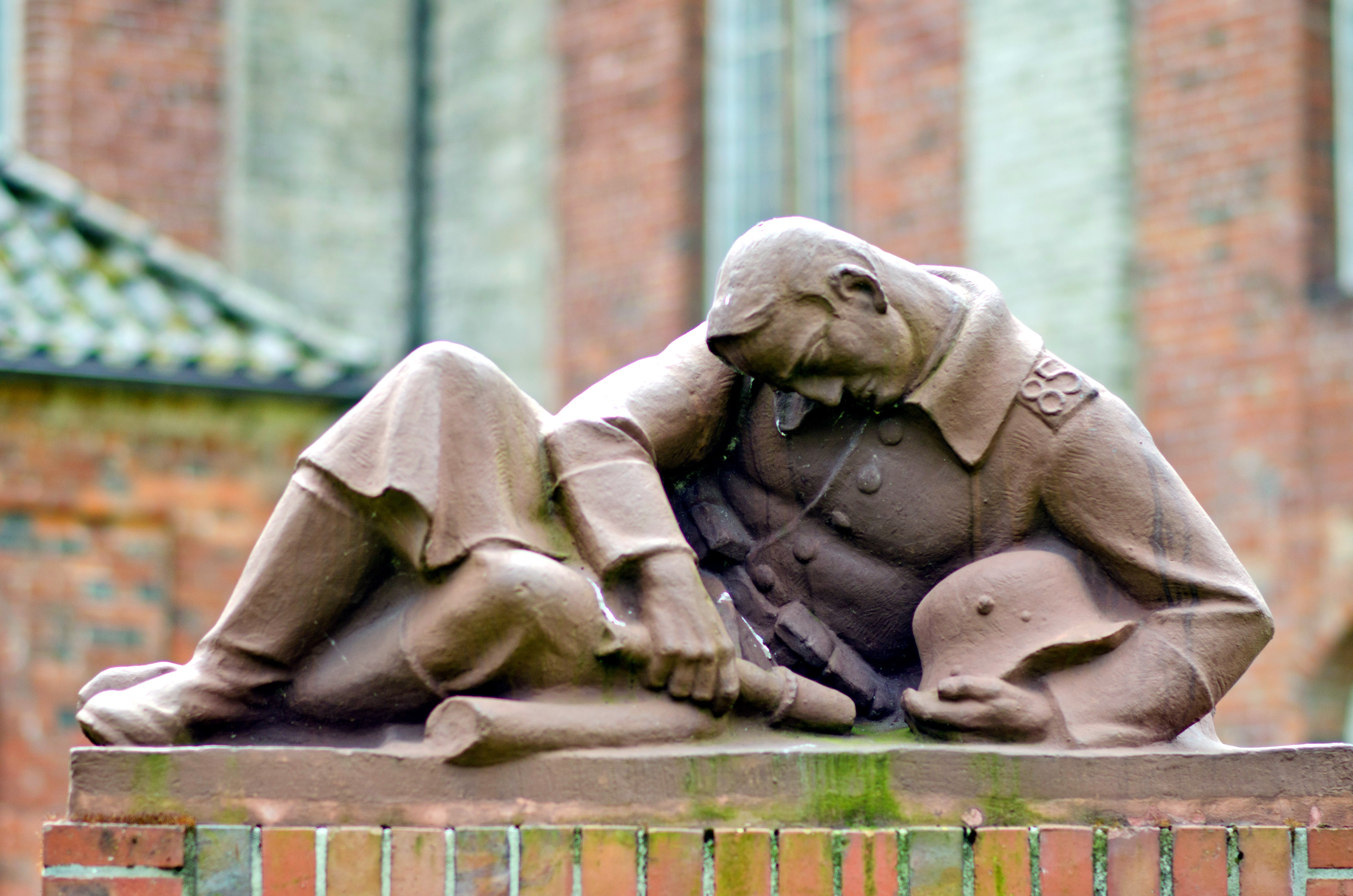 Denkmal für die Rendsburger 85er von Richard Kuöhl: „Regimentsdenkmal Rendsburg“ (Keramik, 1922), Christkirchengemeinde Rendsburg-Neuwerk, Prinzenstraße 13, 24768 Rendsburg